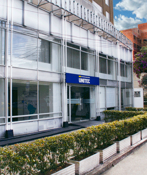 Edificio sede unitec